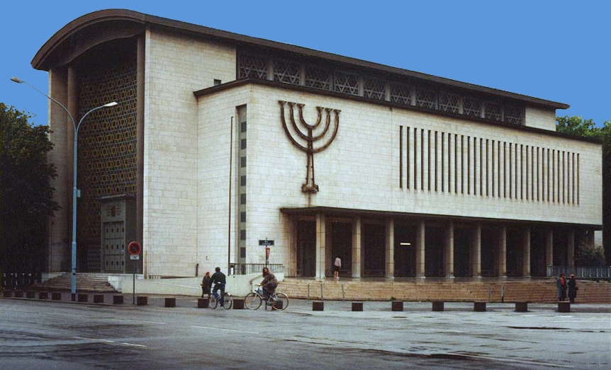 Synagogue de la Paix à Strasbourg par Claude Meyer-Lévy